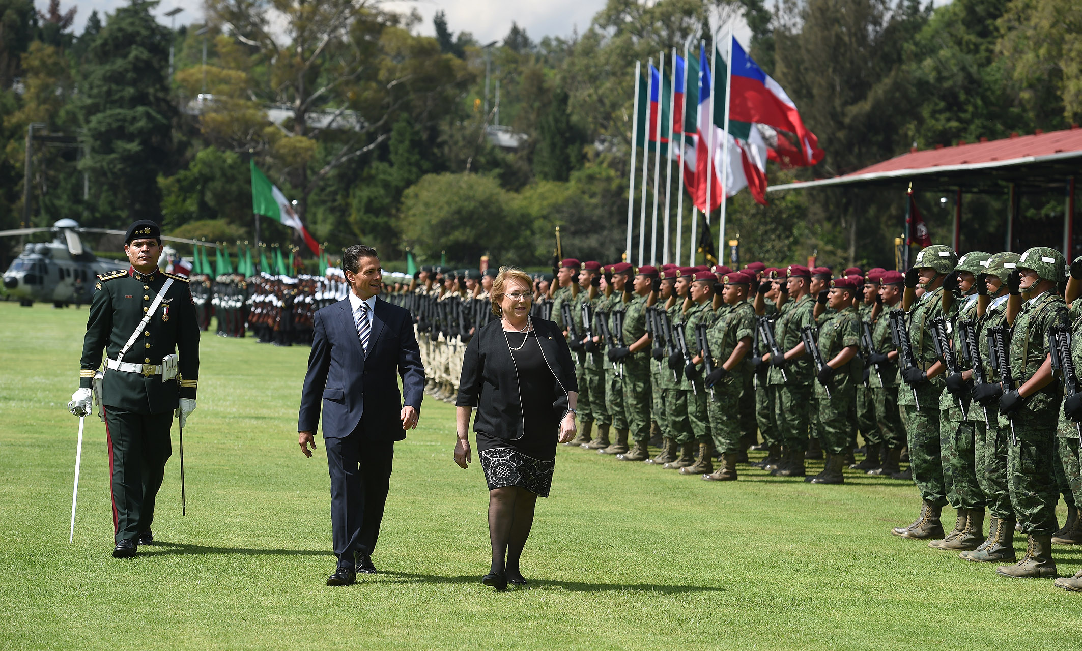 Gobierno de Chile